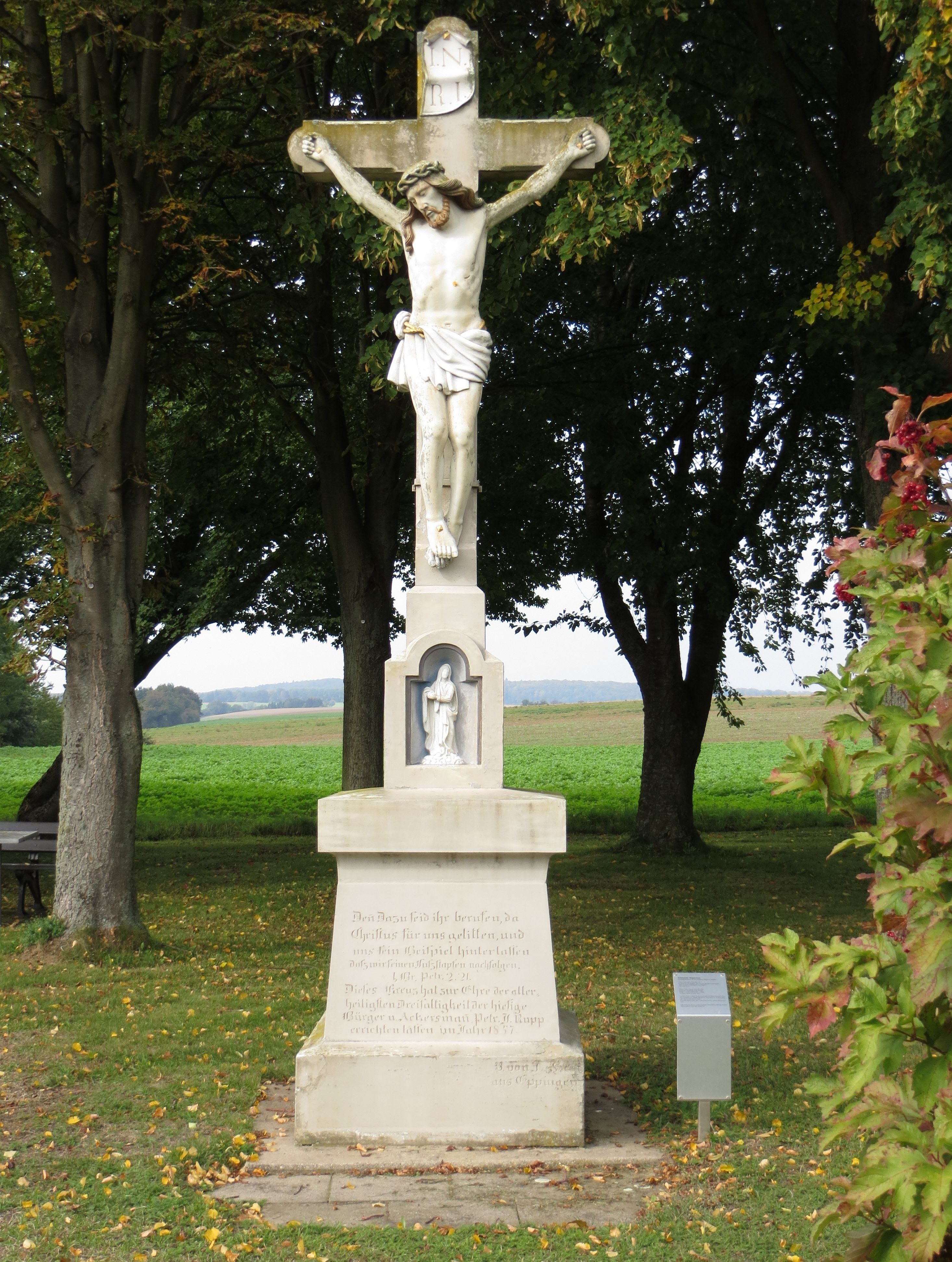 Wegekreuze in Rohrbach am Gießhübel: Dreifaltigkeitskreuz bei der Johannes-Nepomuk-Kapelle. Gestiftet von dem Ackersmann Peter Joseph Rupp, errichtet 1857. Erschaffen von einem Eppinger Steinhauer, dessen Name nicht mehr lesbar ist.